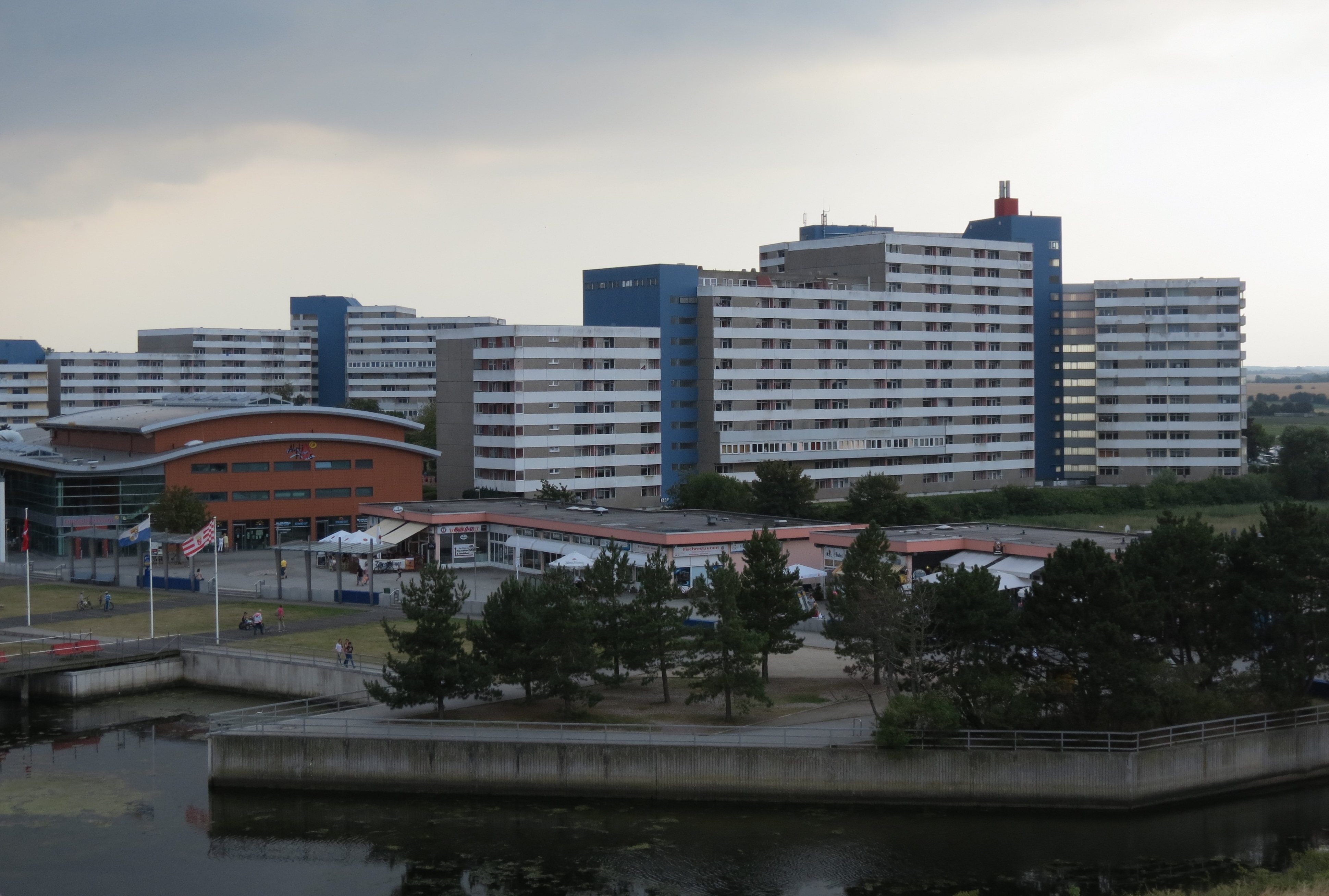 Ferienzentrum Heiligenhafen